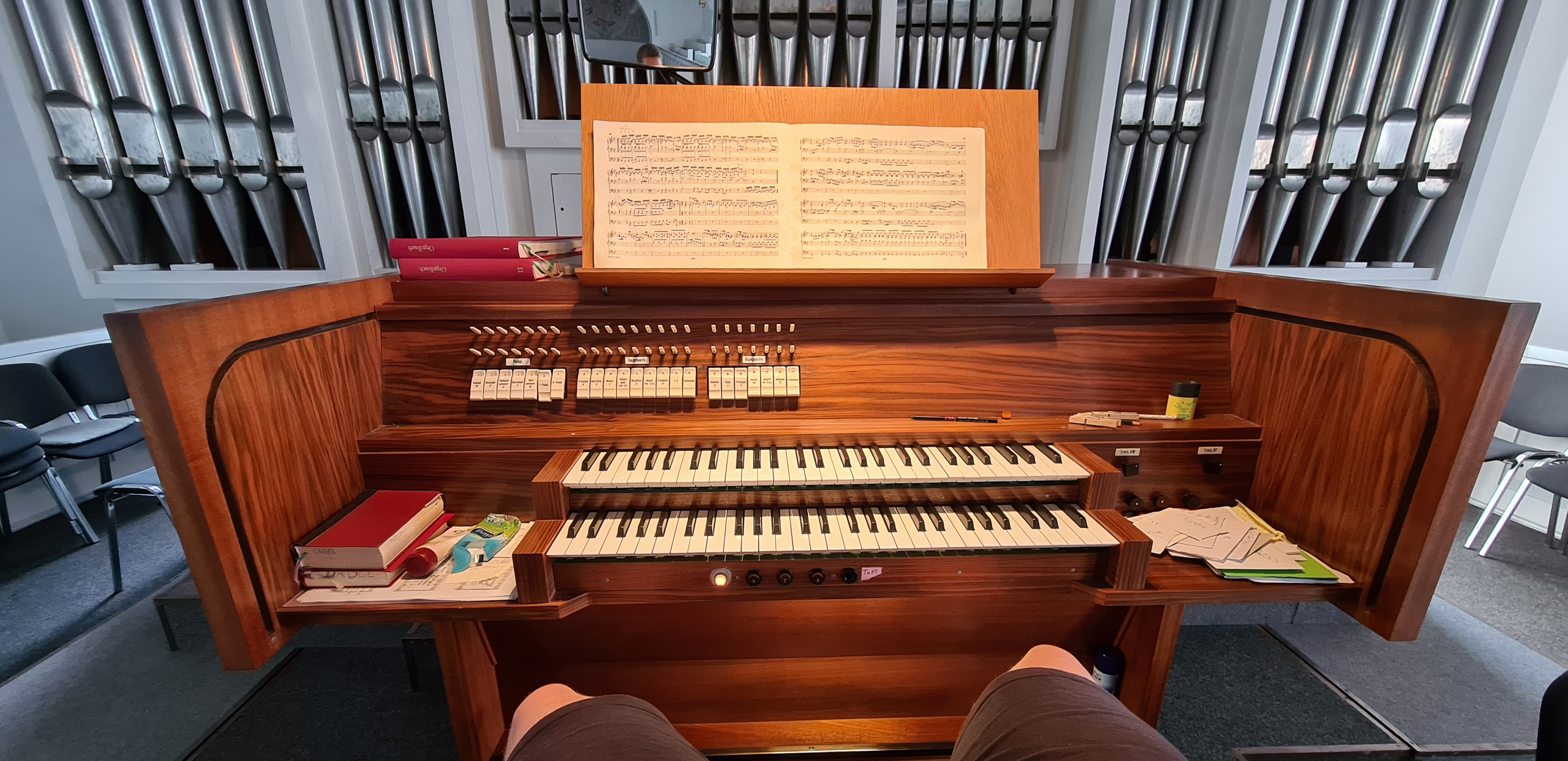 Dies zeigt den Spieltisch der Orgel, der ev. Kirche in Drabenderhöhe sowie einen kleinen Ausschnitt des Orgelprospekts